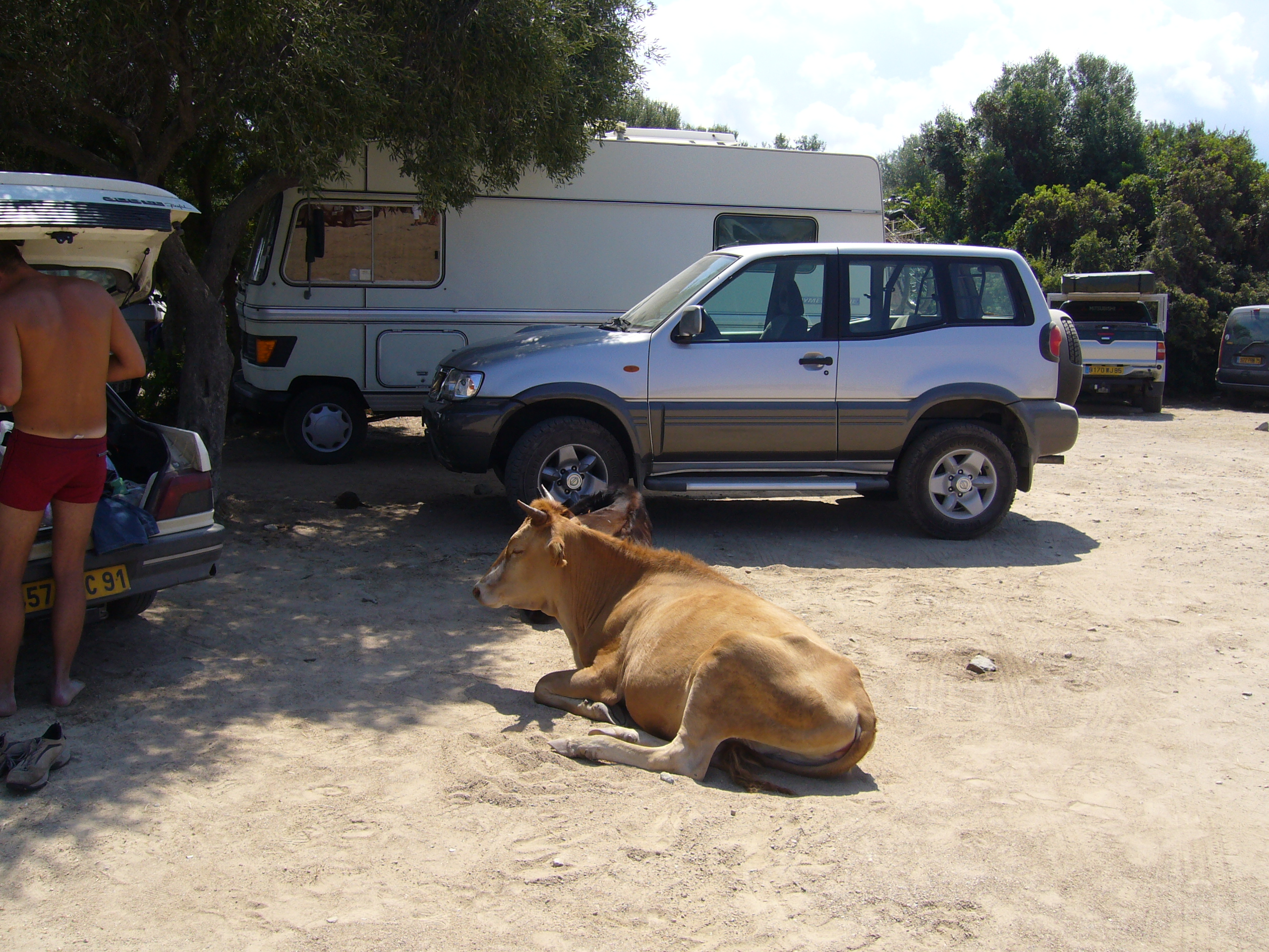 Haute-Corse (France) - Au Nord-Ouest de St-Florent, un parking sur une route du Désert des Agriates.